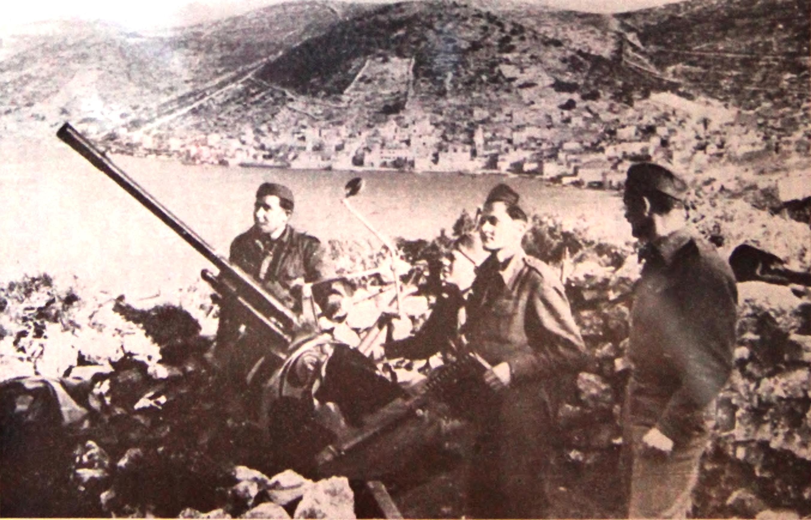 Protiletalska top na Visu.